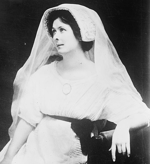 Amercian dancer Isadora Duncan (1877-1927)